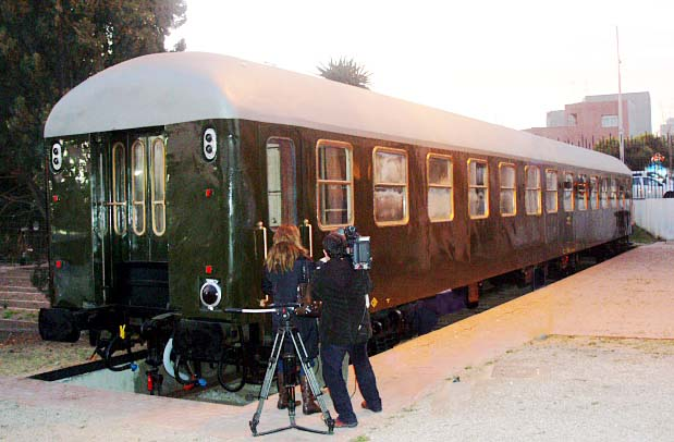 Tren "Sevillano"